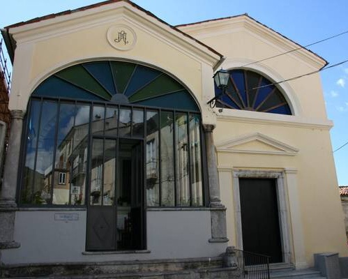 Dimora invernale della Statua della SS. Vergine delle Nevi in Lagonegro